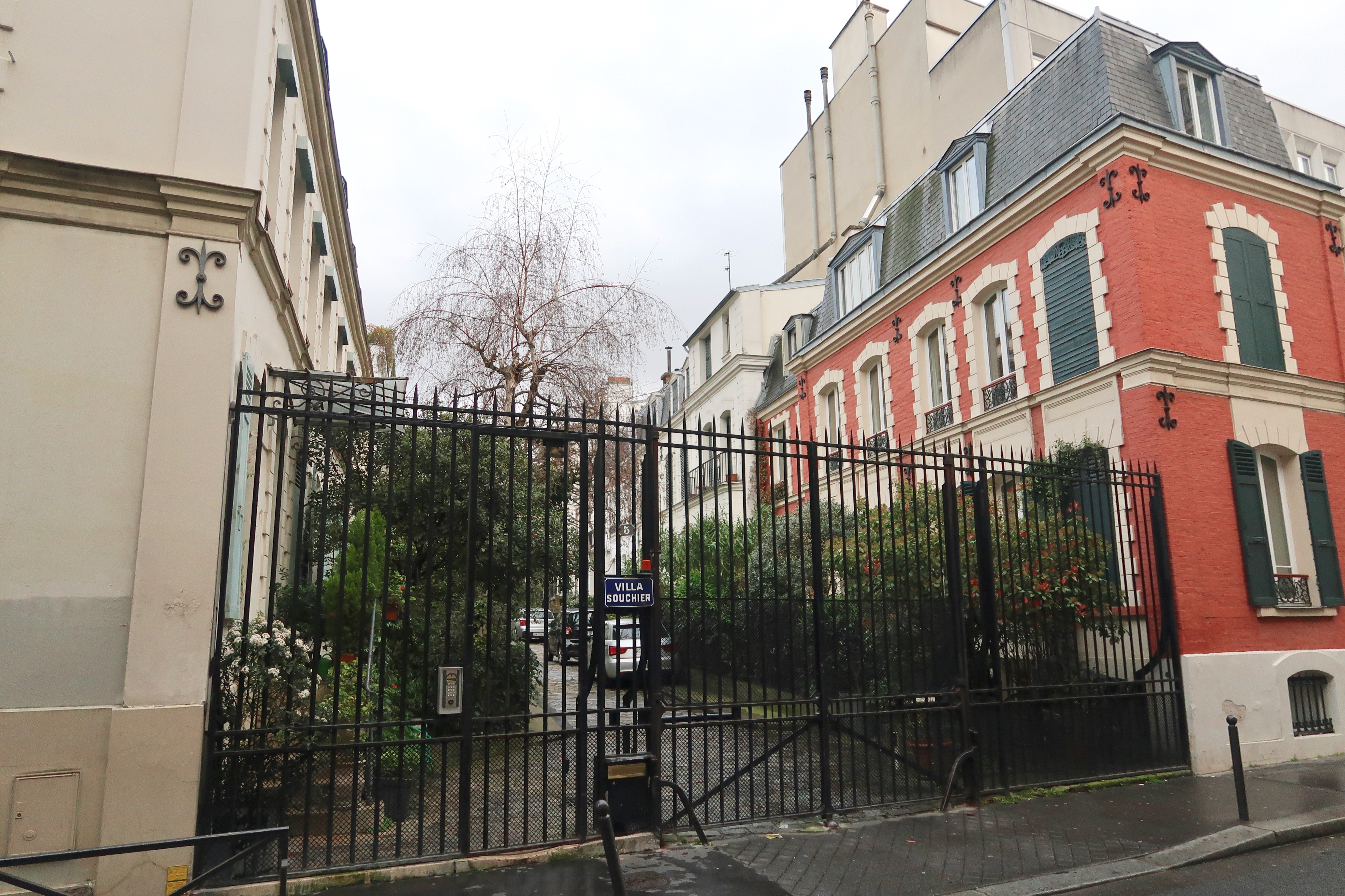 Villa Souchier (Paris, 16e).